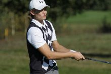 Berry Jole, winnaar Lochems Jeugd Open 2010